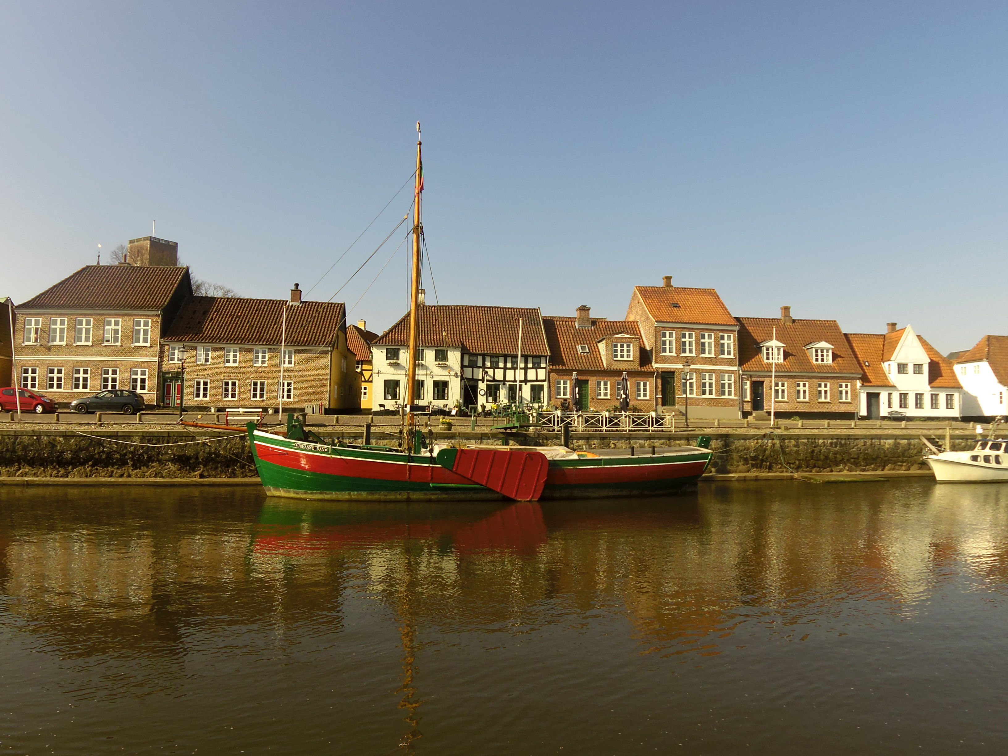 Everten Johanne Dan ved Skibbroen i Ribe